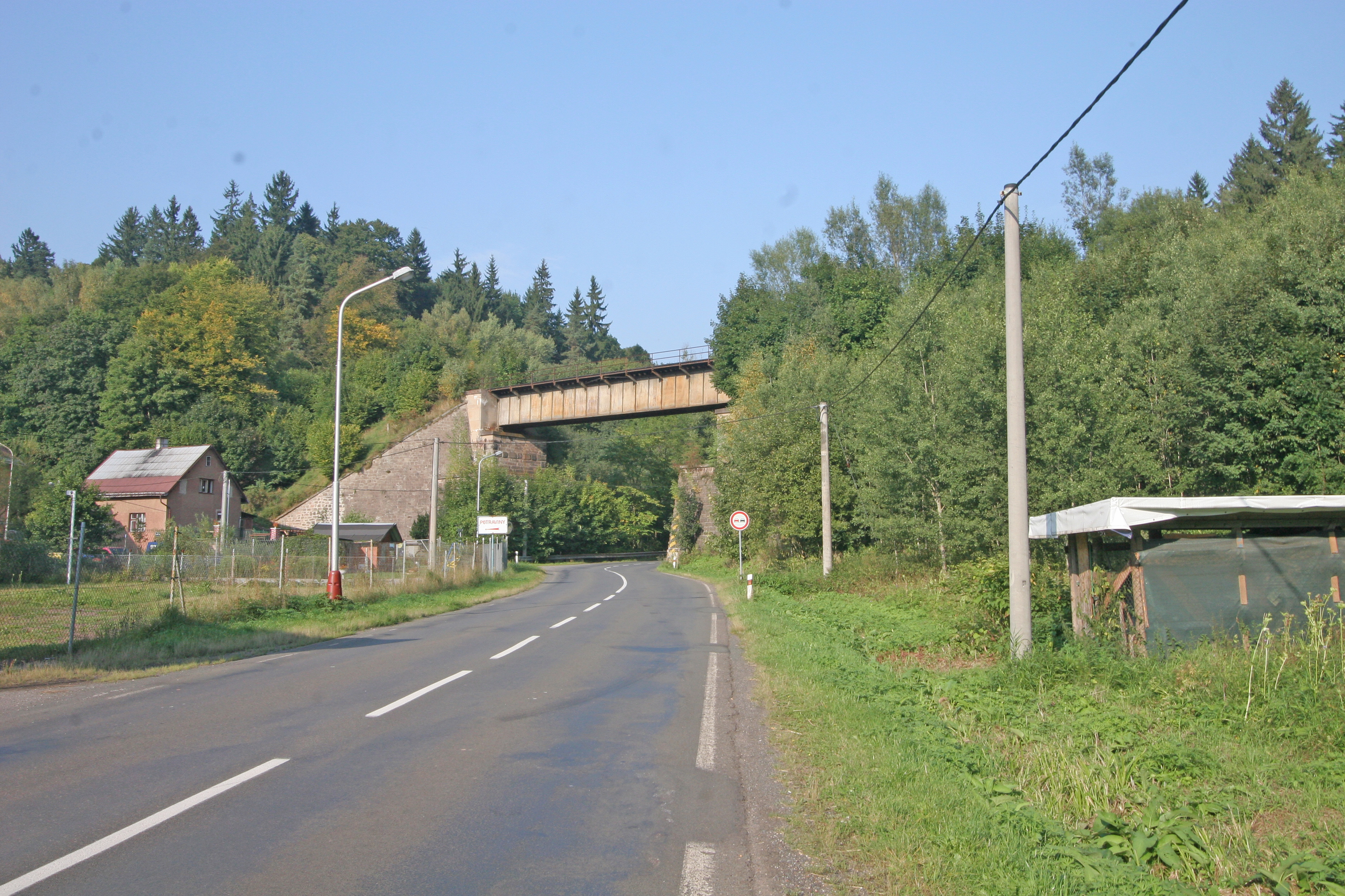 Železniční most, Libeč (Trutnov).